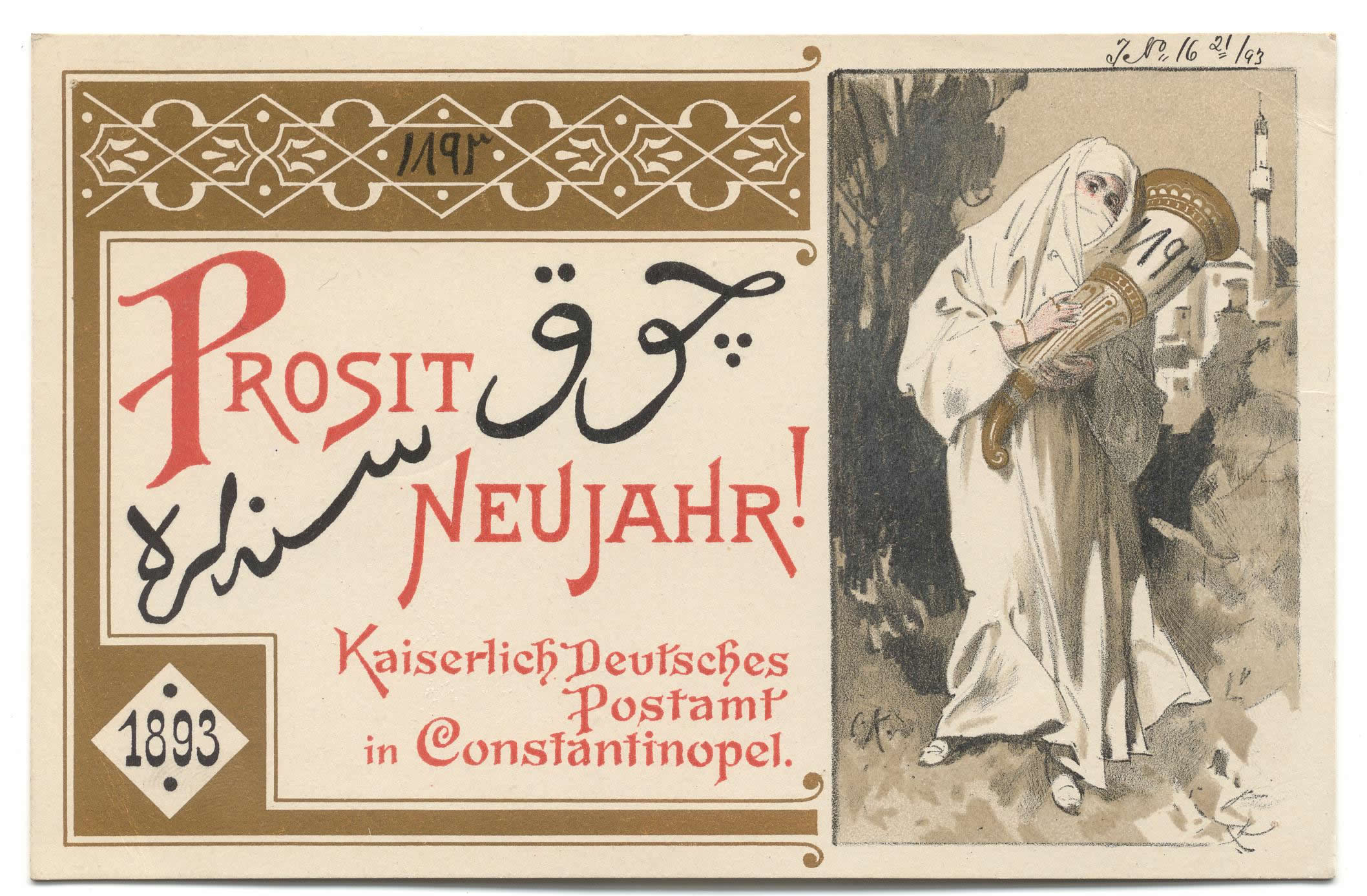 New Year card/Nyttårspostkort fra Kaiserlich Deutsches Postamt in Constantinopel 1893. I arkivet etter Samferdselsdepartementet, Poststyret, 1. postadministrasjonskontor.